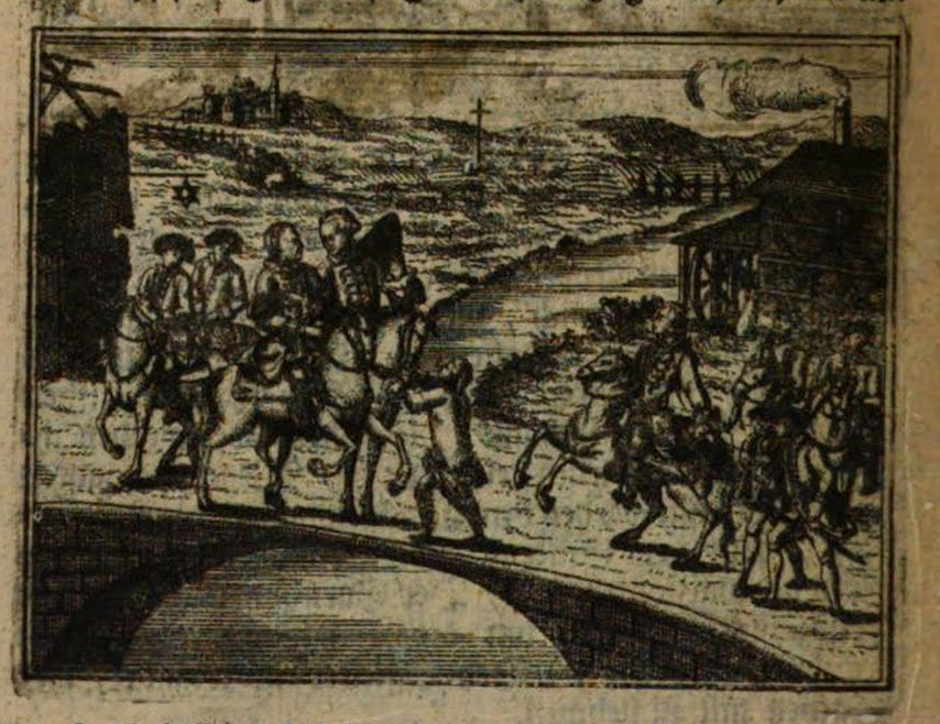 Illustration aus: Des Neu eröffneten Historischen Bilder=Saals vierzehender Teil / Erster Periodus von den merkwürdigen Geschichten die sich vom Anfang des Jahrs 1761 bis zu dem Hubertusburger Frieden 1763 unter der glorreichen Regierung Kaisers Franz des Ersten zugetragen haben, Erster Periodus, I. Capitel, S. 140.